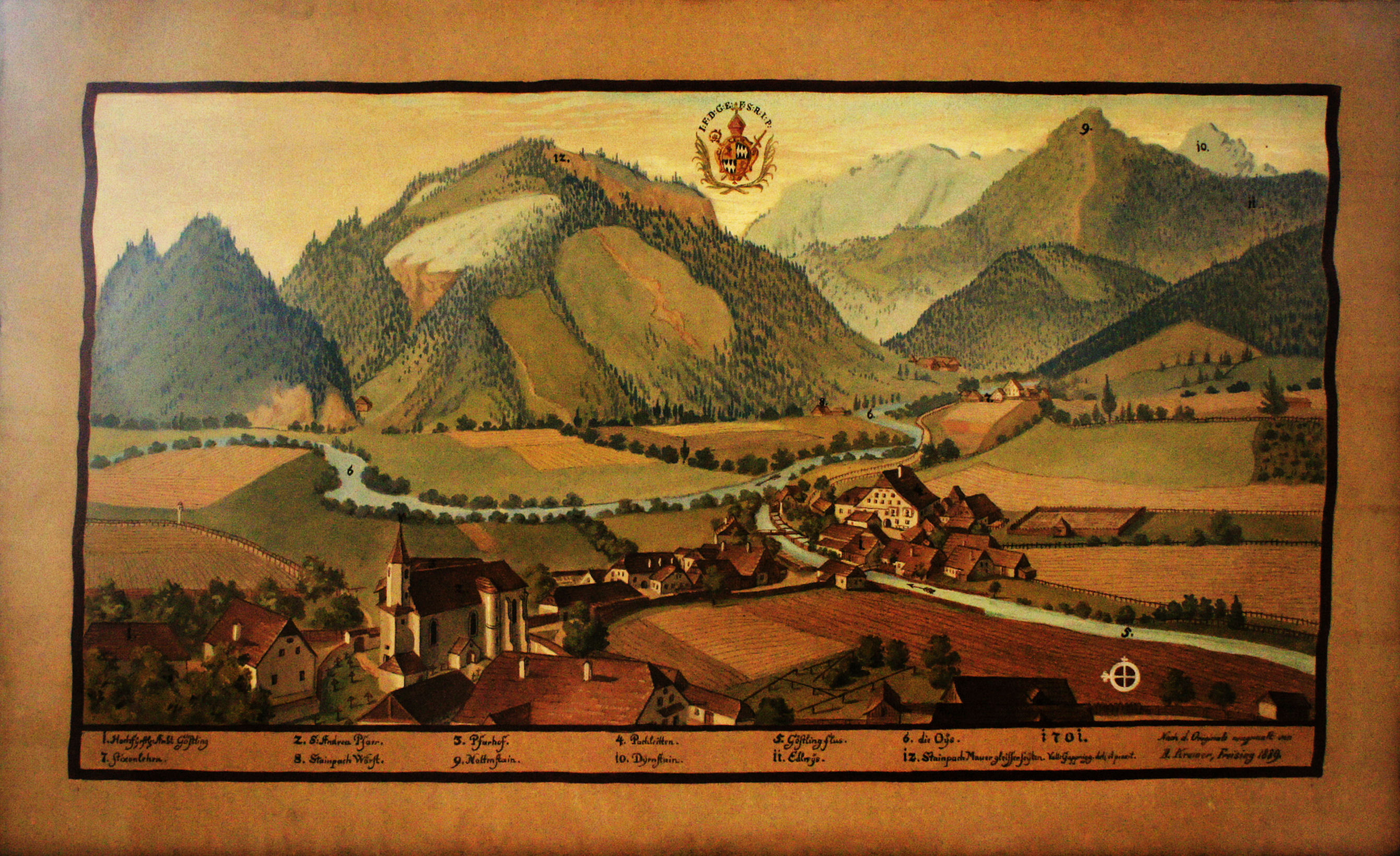 Gemälde aus einer Serie mit Darstellungen von Besitztümern des Hochstifts Freising im Fürstengang zwischen Fürstbischöflicher Residenz und Freisinger Dom.